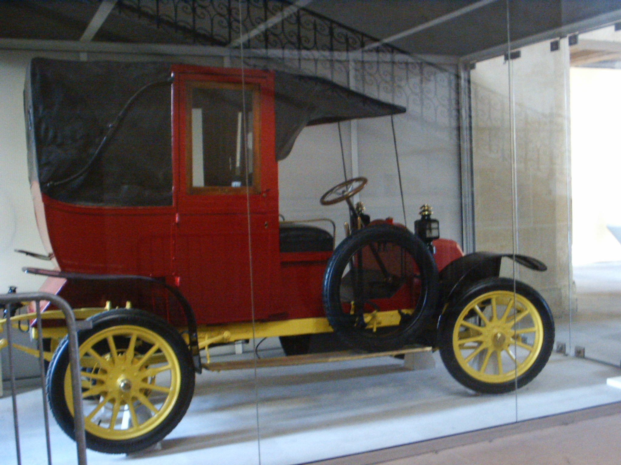 Photo personnelle libre de droits sans copyright, taxi de la Marne exposé en octobre 2005 à l'hôtel des Invalides à Paris, France.